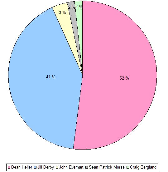 Résultats des élections 2008 à la Chambre des représentants des Etats-Unis, pour le 2e district du Nevada